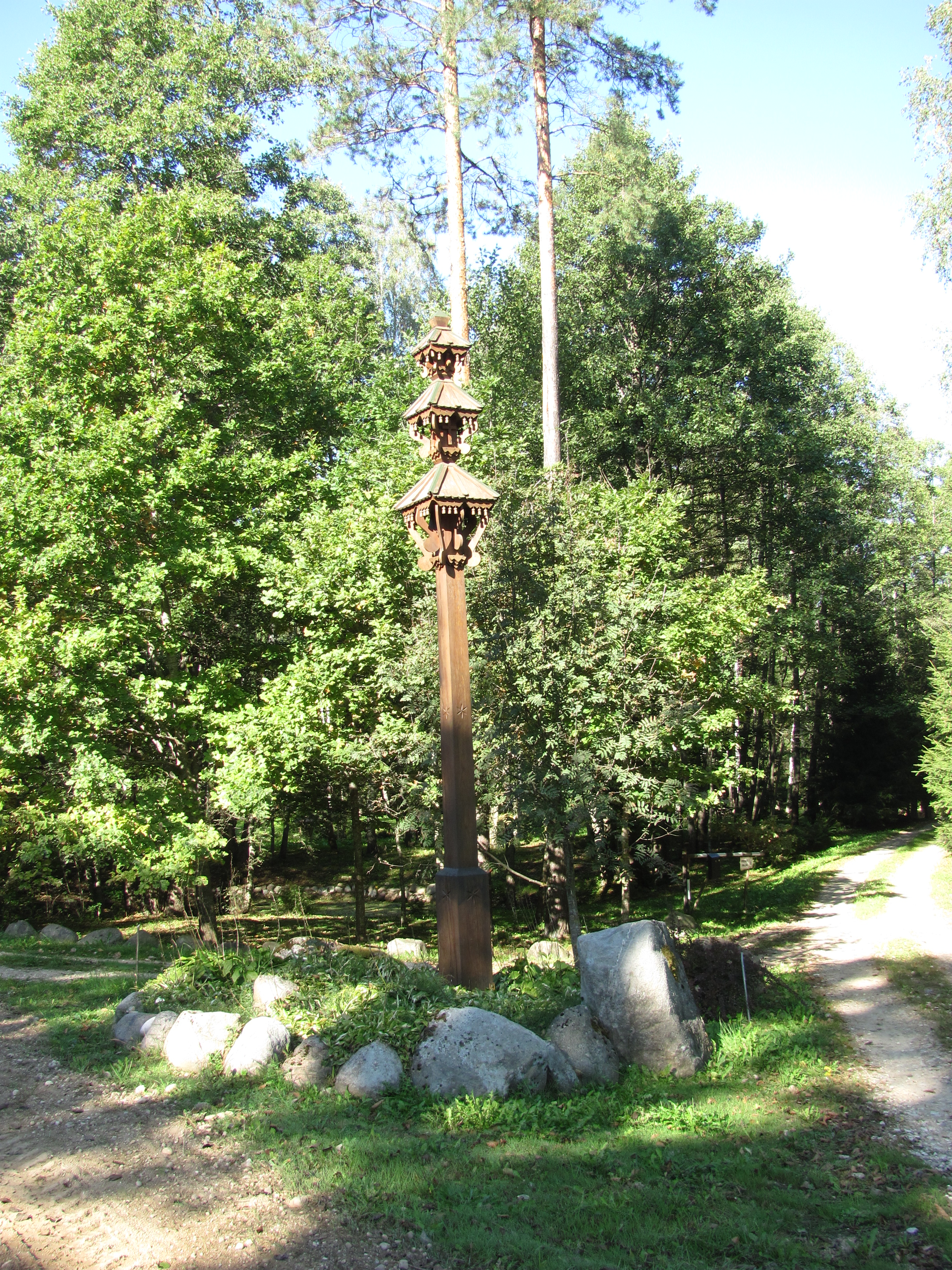 Degučių sen., Lithuania